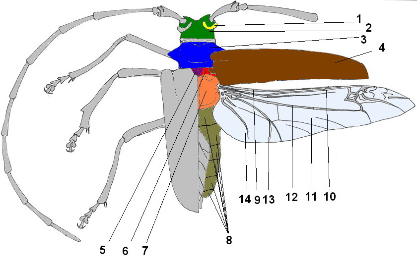 Морфологія дорзальної сторони жука-вусача та жилкування крила на прикладі Monochamus sartor